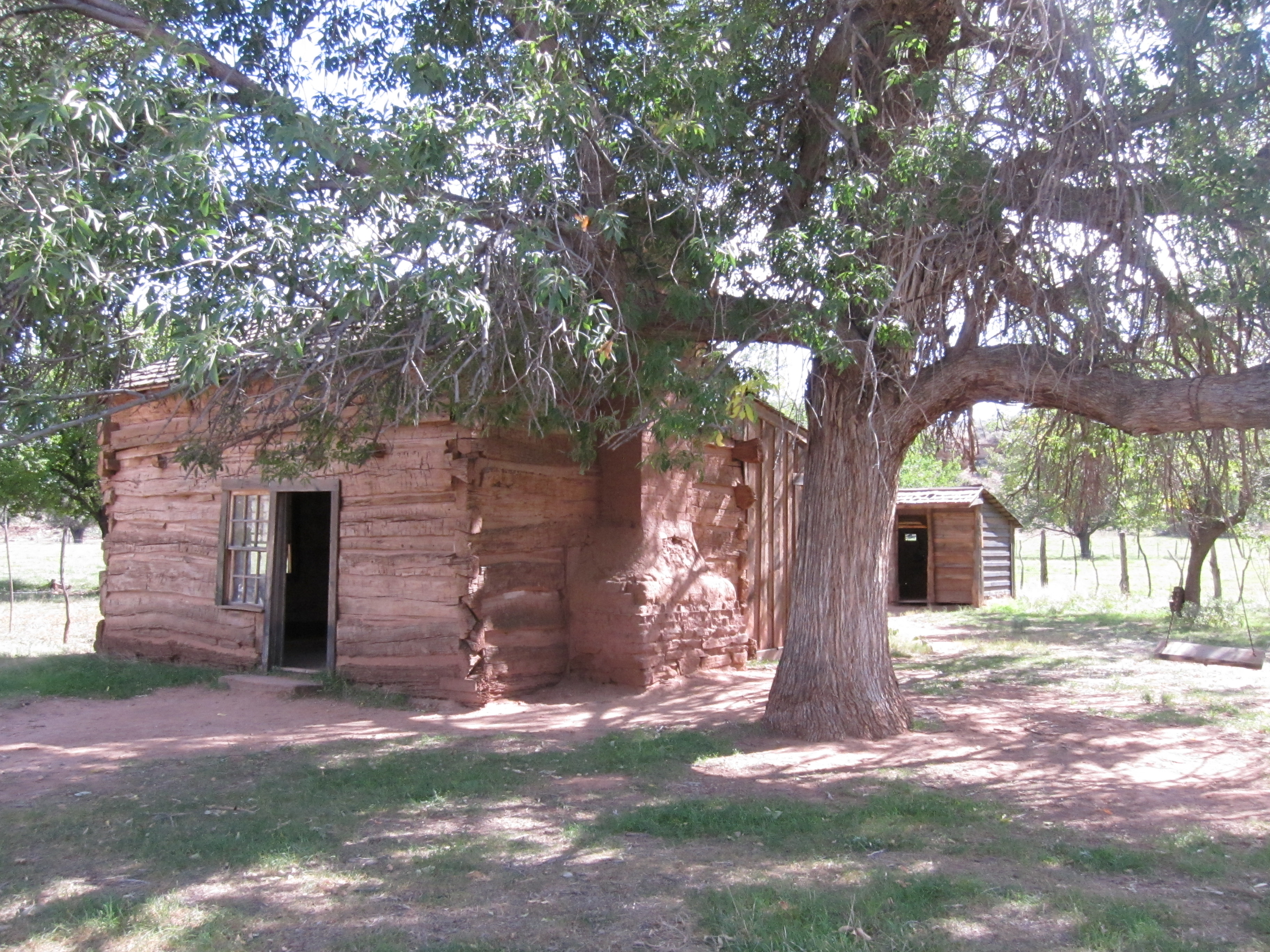 La maison de Louis Marie Russel a Graffton